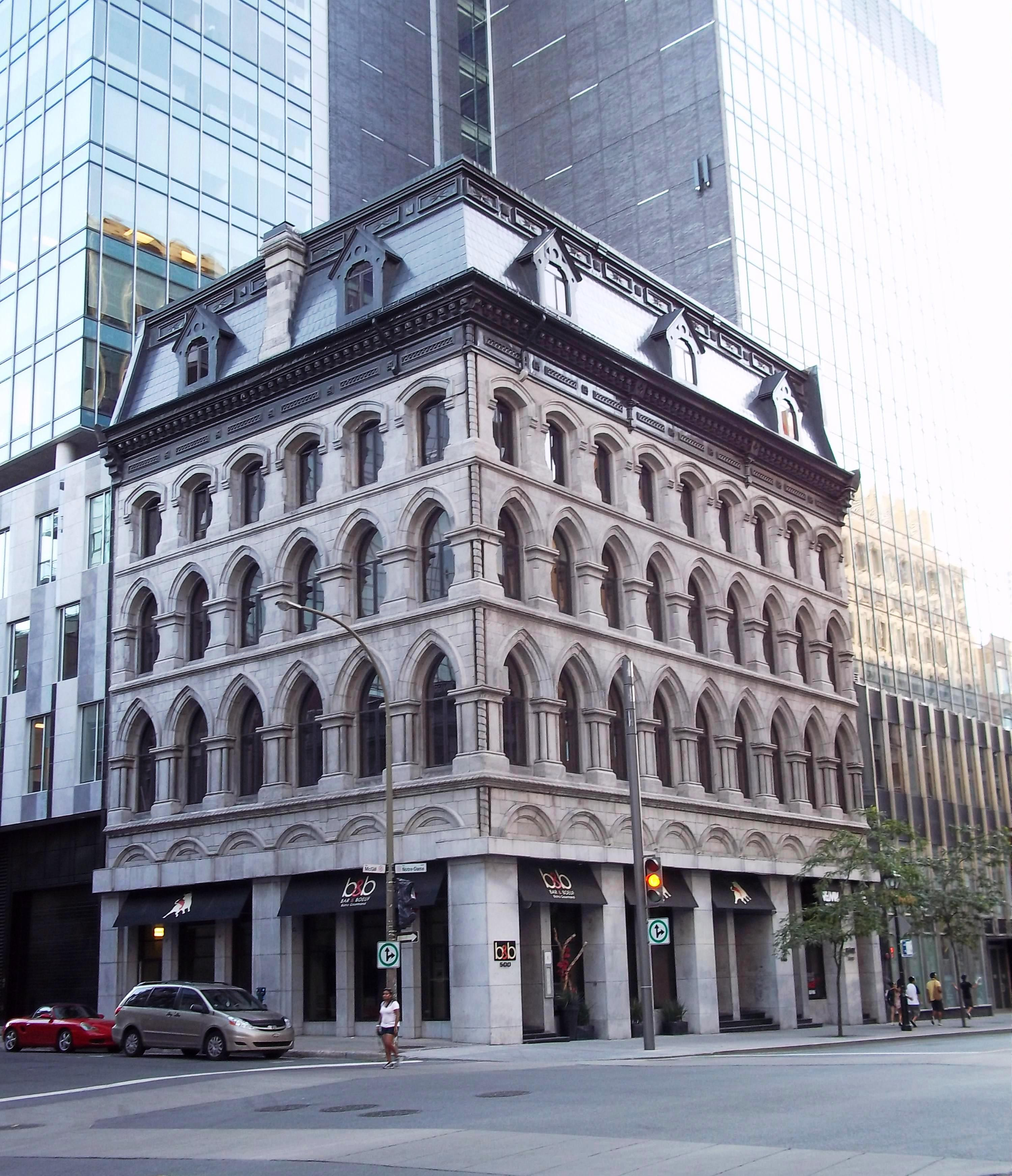 Immeuble Wilson Chambers, 500-510, rue McGill, Montréal info